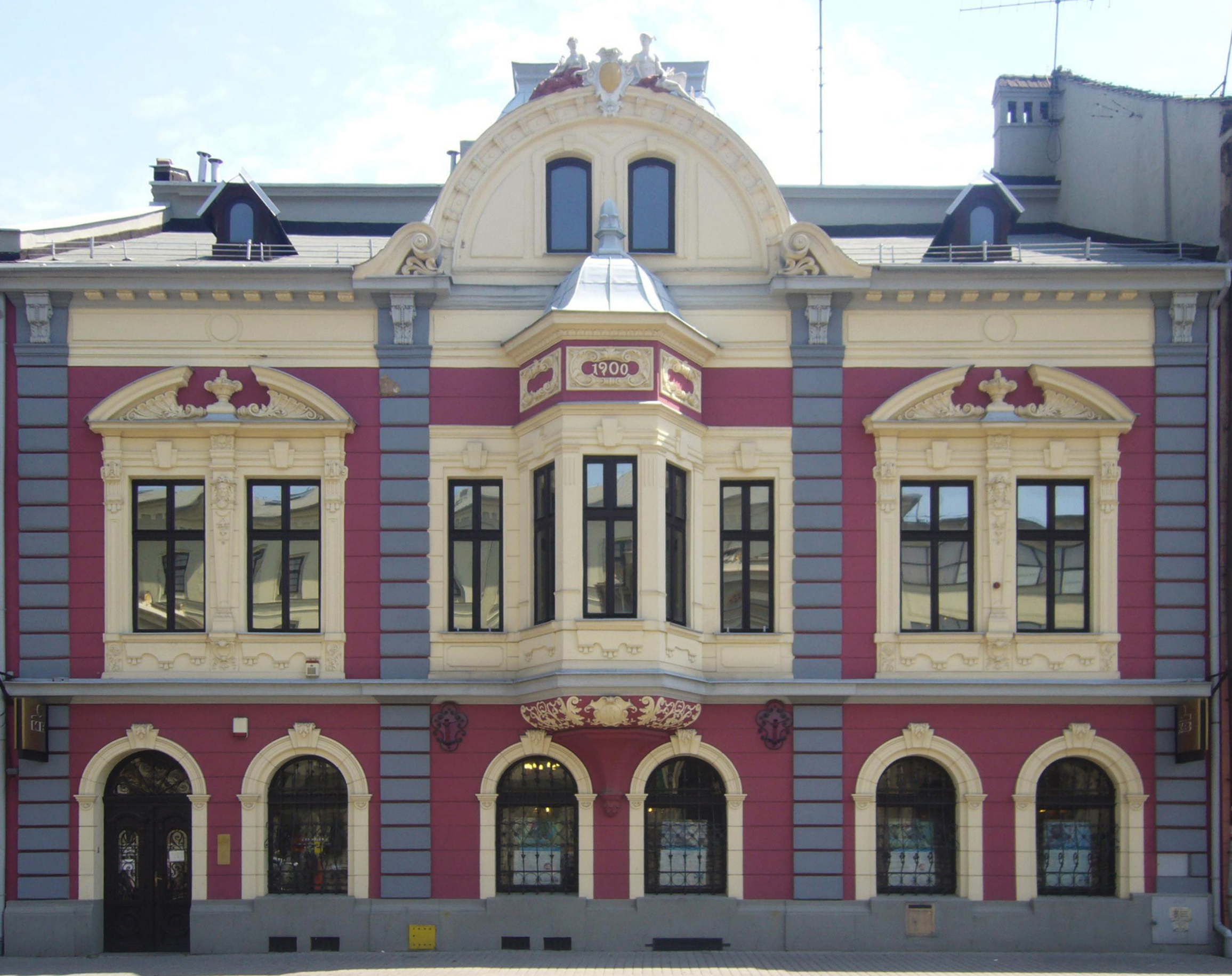 Bielsko-Biała - Zywieckie Przedmieście